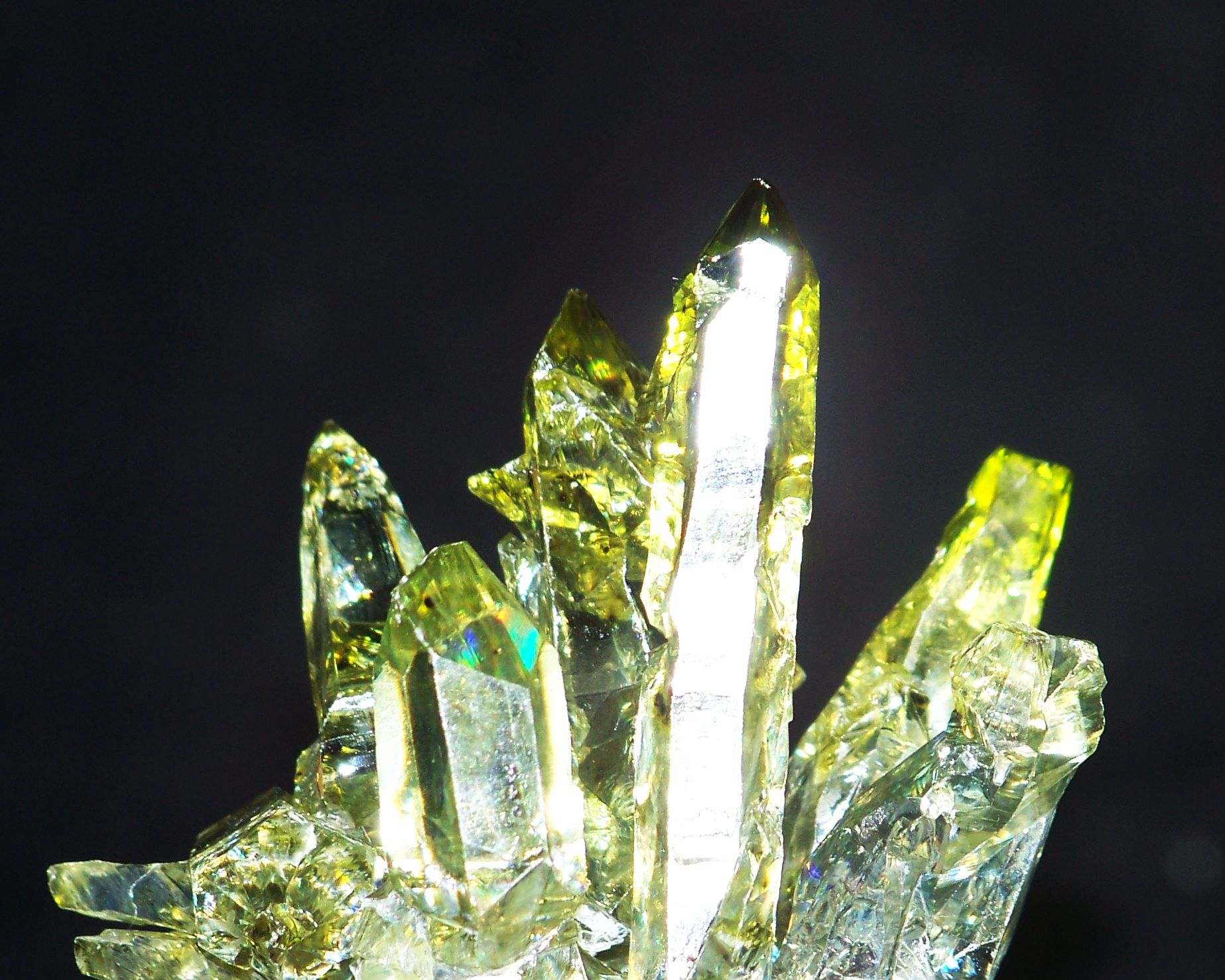 Cynkit